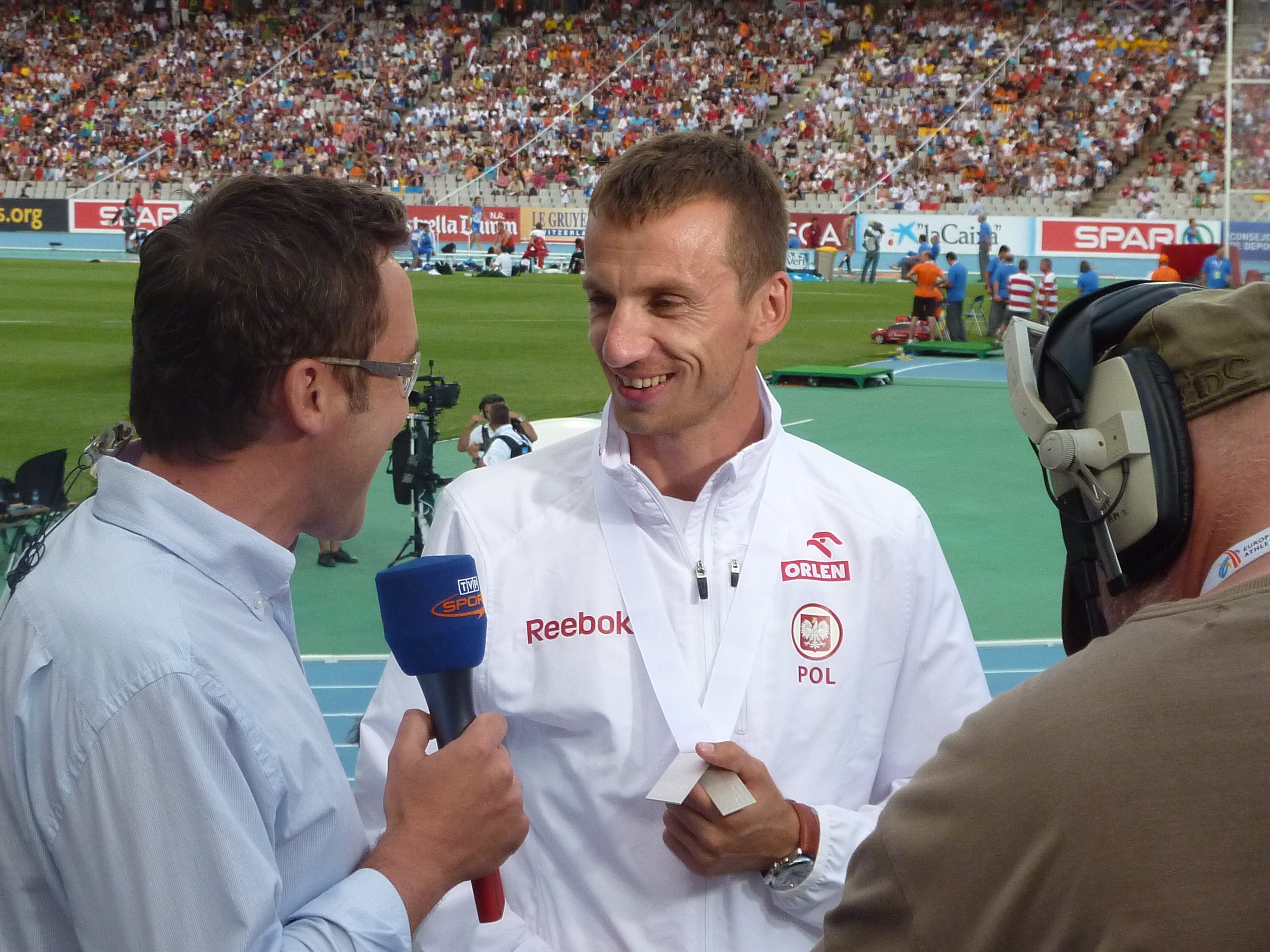 Grzegorz Sudol